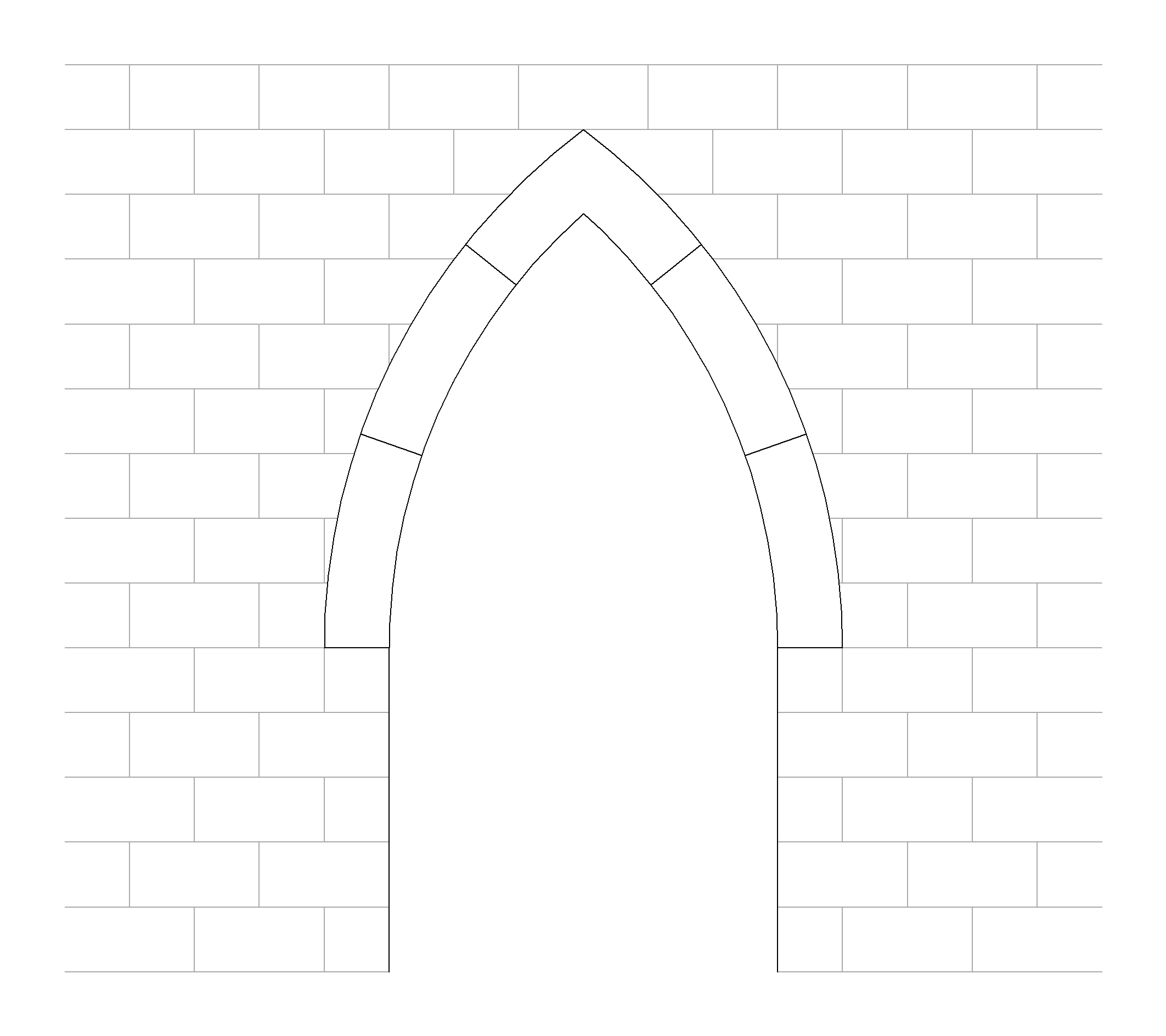 Spitzbogen, überhöht